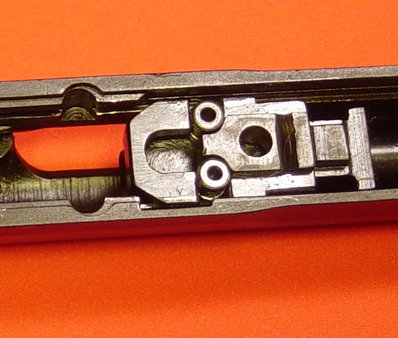 Cz52 during recoil